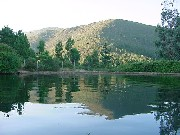 Estanque de la palla